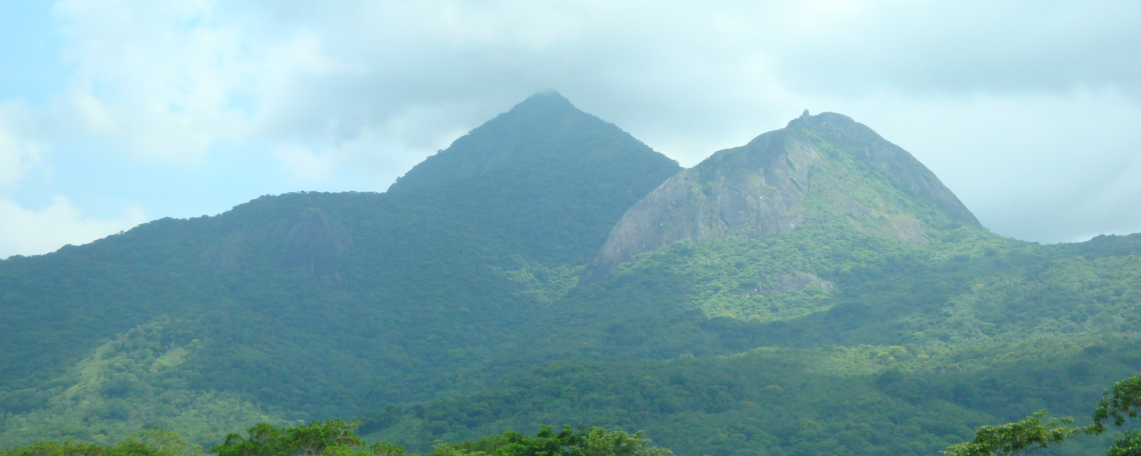 Cerro_de_Bernal_Norte